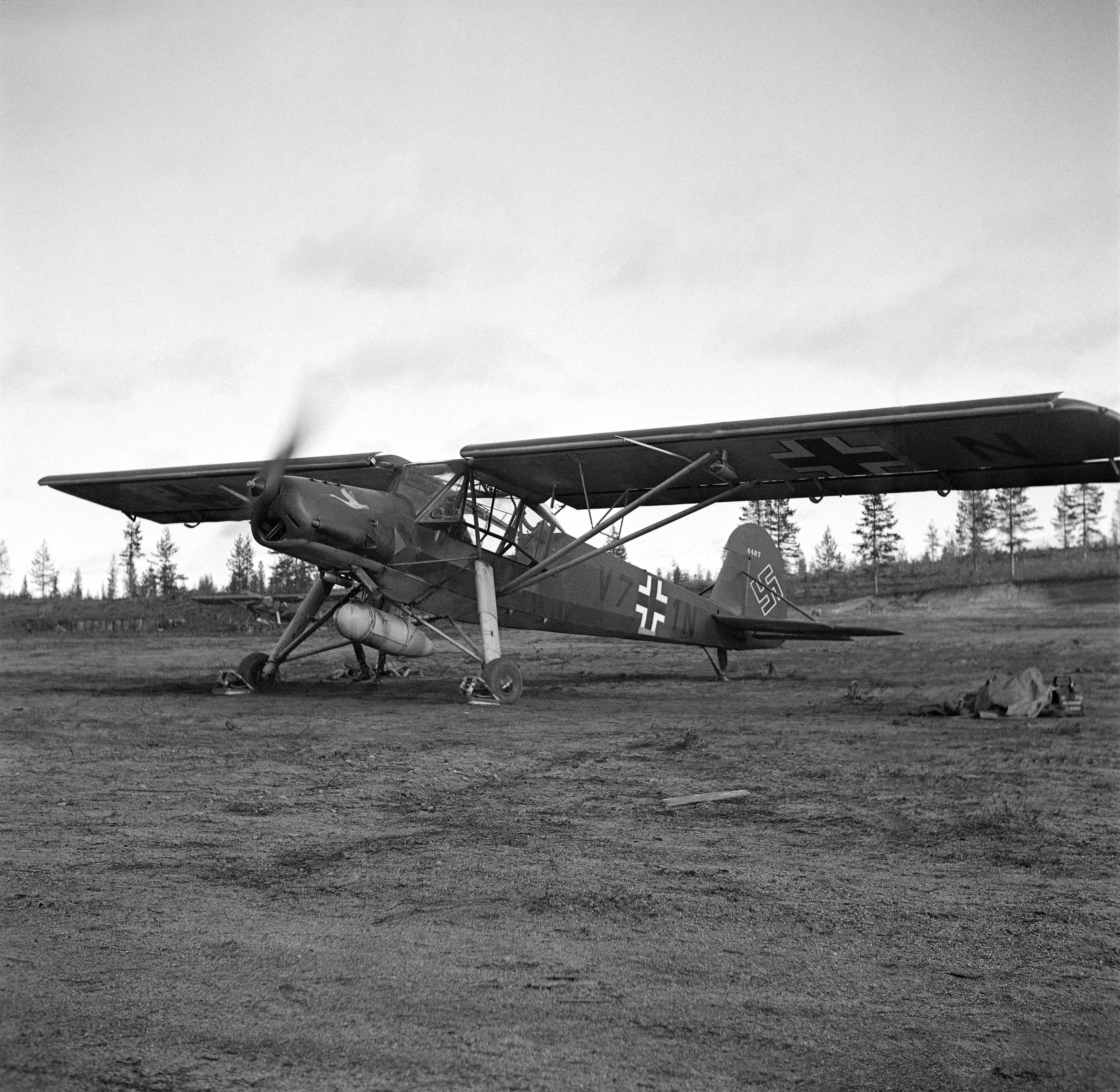 Fieseler Storch pommilastissa valmiina tehtäväänsä. (Kuvassa on lähitiedustelulentue 1(H)/32:n Fi 156 Storch lentokone). Kuvauspaikka: Kemijärvi